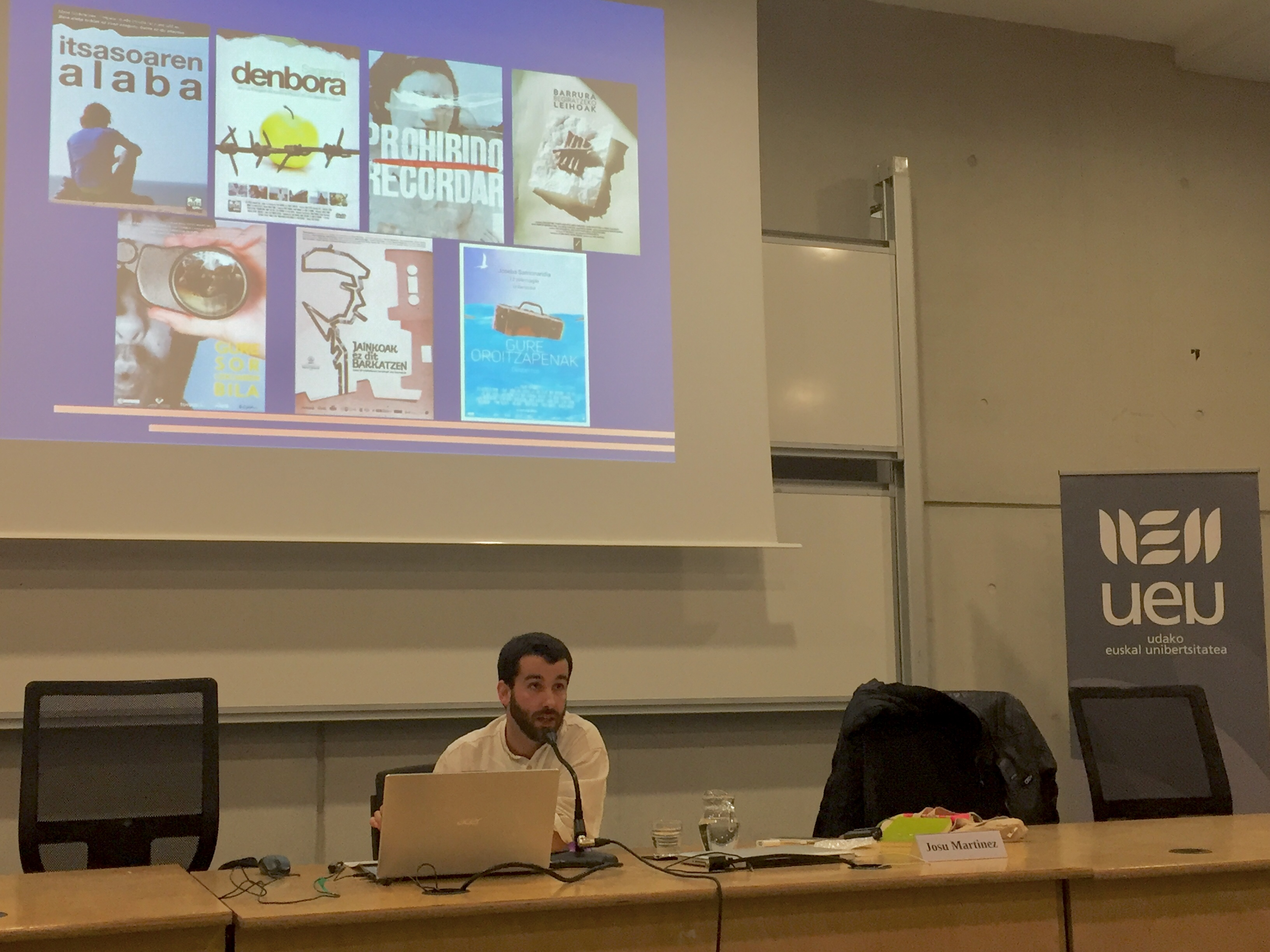 Josu Martinez, Ikergazte 2019 kongresuko hitzaldi gonbidatuan.